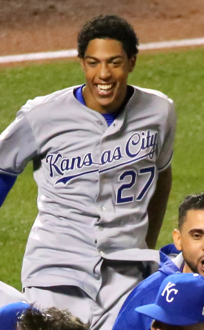 Raúl Adalberto Mondesí